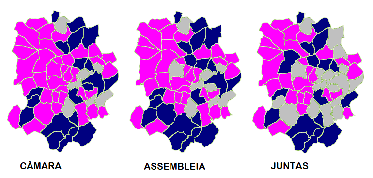 Mapa ilustrativo do partido mais votado por freguesia em Barcelos (2017)